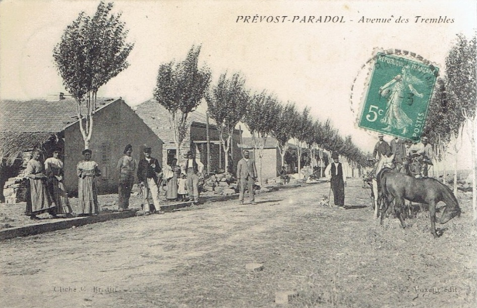 Colons européens dans la localité de Prévost-Paradol (aujourd'hui Mechera Sfa), Algérie, au début du XXe siècle. Par décision du gouverneur général en 1891, le centre de population de Mechera Sfa est appelé Prévost-Paradol, du nom du journaliste et essayiste Lucien-Anatole Prévost-Paradol qui préconisa de faire de l'Algérie une colonie de peuplement français dans son livre La France nouvelle (1868). Le centre est érigé en commune de plein exercice par décret du 28 décembre 1928.